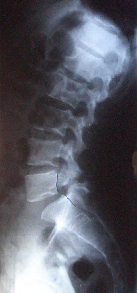 Röntgenaufnahme (1986) einer Lendenwirbelsäule mit deutlicher Verschiebung zwischen 5. Lendenwirbel und Kreuzbein eines männl. Patienten im Alter von 24 Jahren